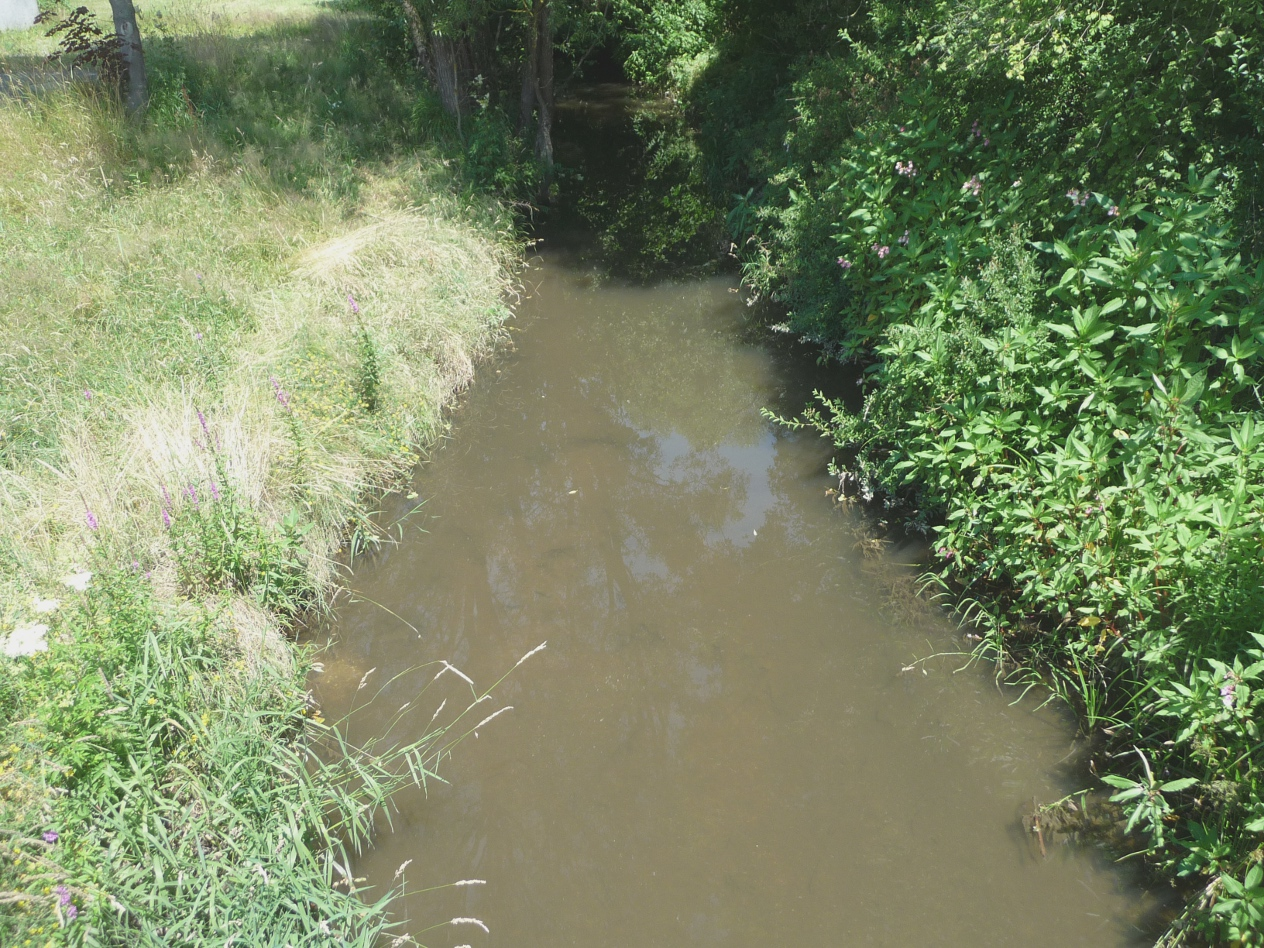 Die Kleine Ohe in Schöllnach